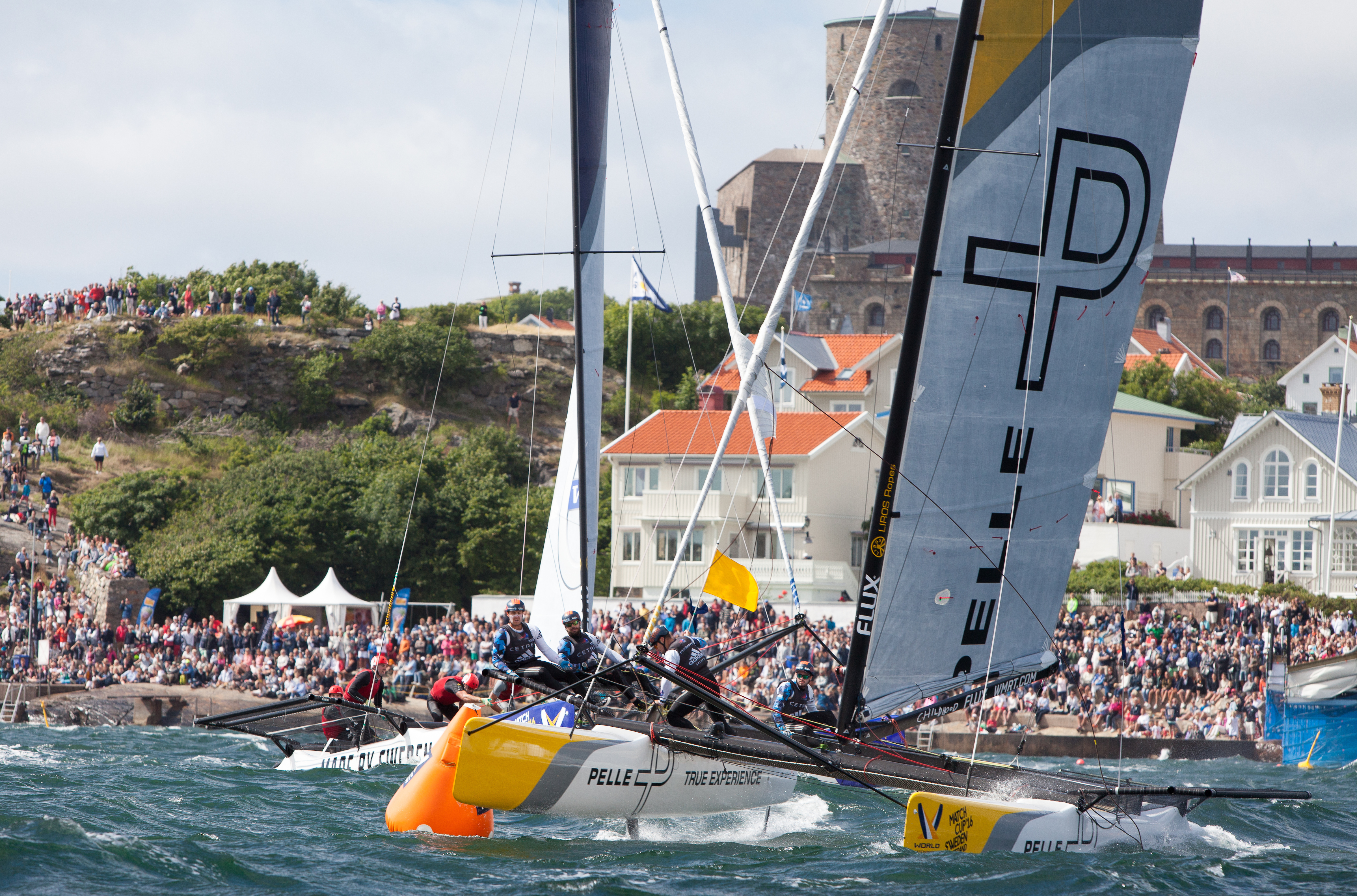 Finalsegling i Match Cup Sweden 2016 mellan Phil Robertson (NZL) och Taylor Canfield (USA).